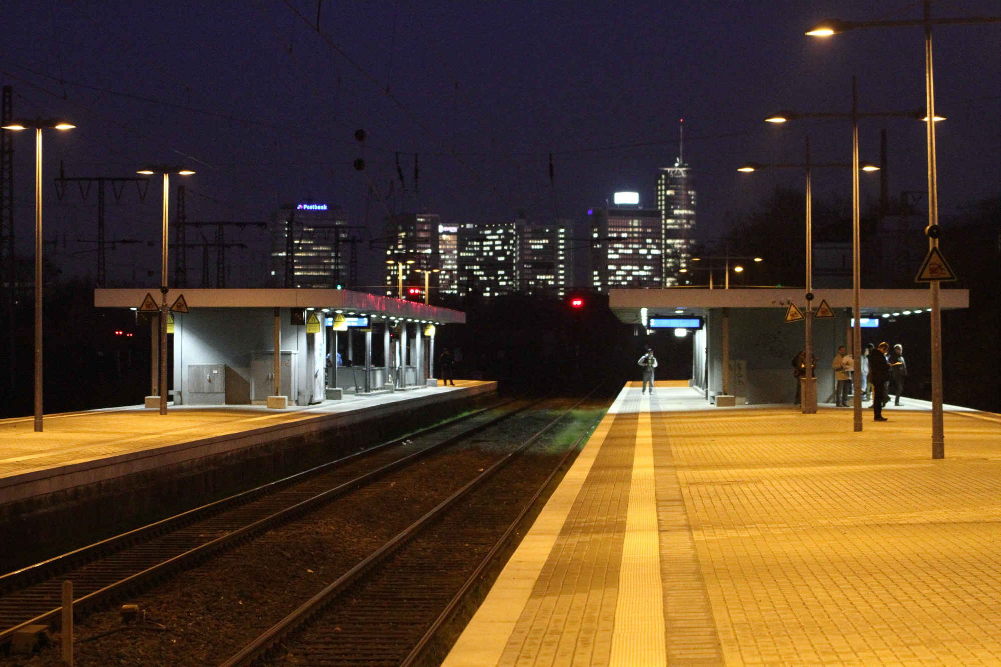 Bahnhof Essen West bei Nacht